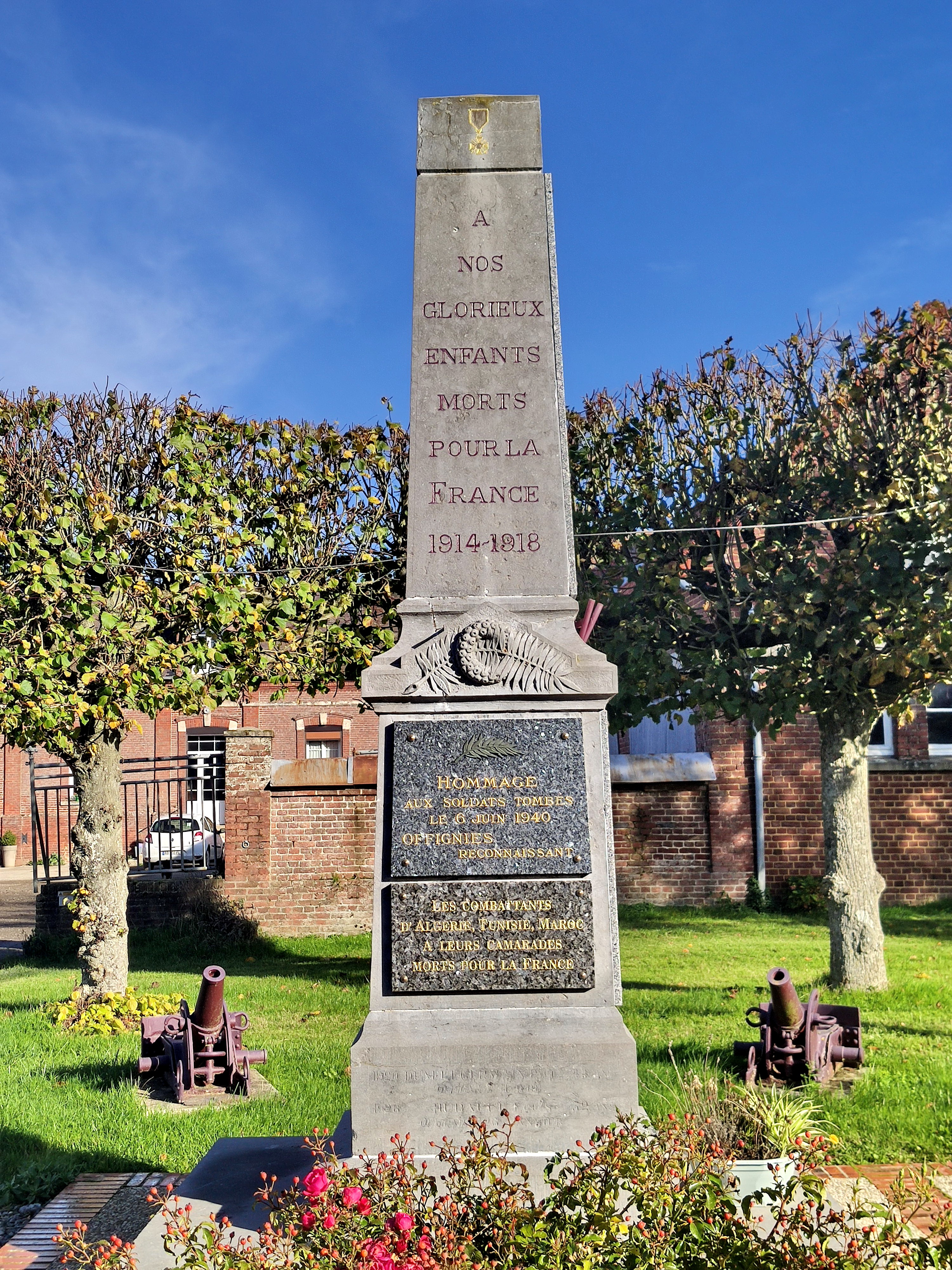 Offignies, Somme, France : le monument aux morts.